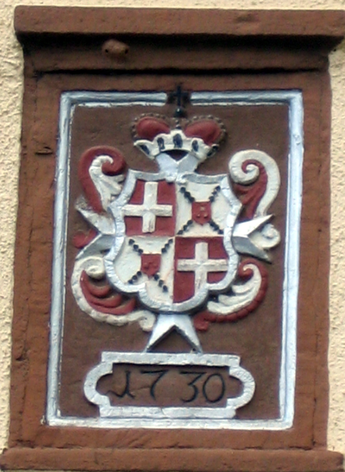 Wappen des Fürsten von Heitersheim Philipp Wilhelm von Nesselrode und Reichenstein am Kanzlerwohnhaus in Heitersheim